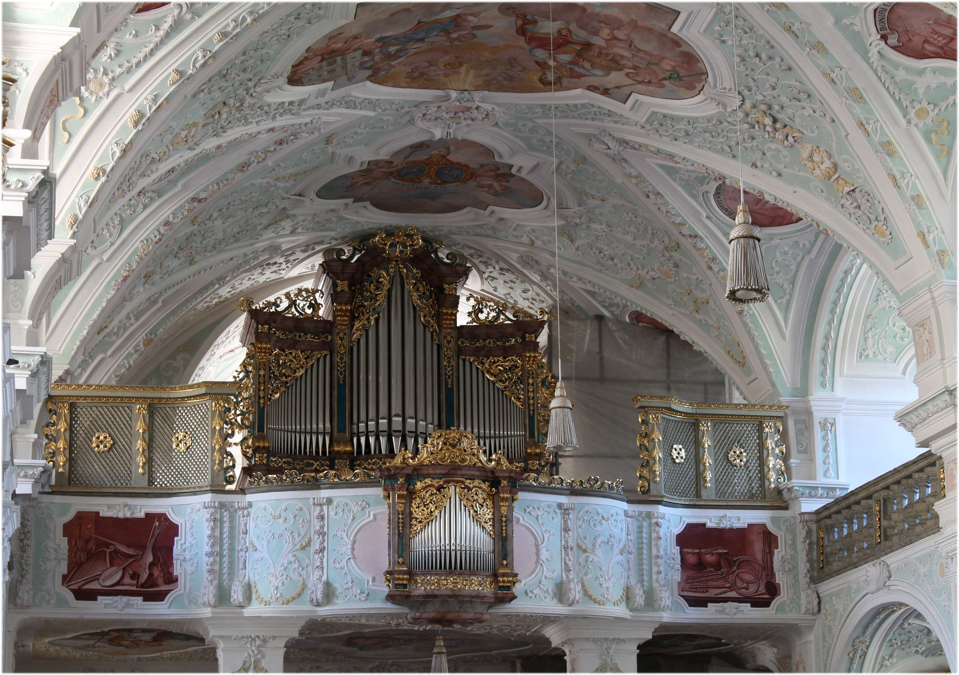 Orgel vom Kloster Au am Inn (2004, Mathis, II/21)